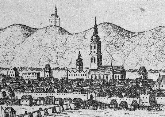 Pogled na stolnico leta 1681